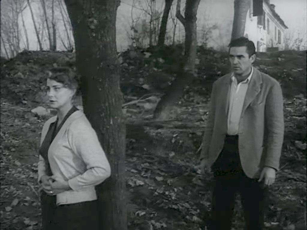 Screenshot del film Il grido (1957) di Michelangelo Antonioni.